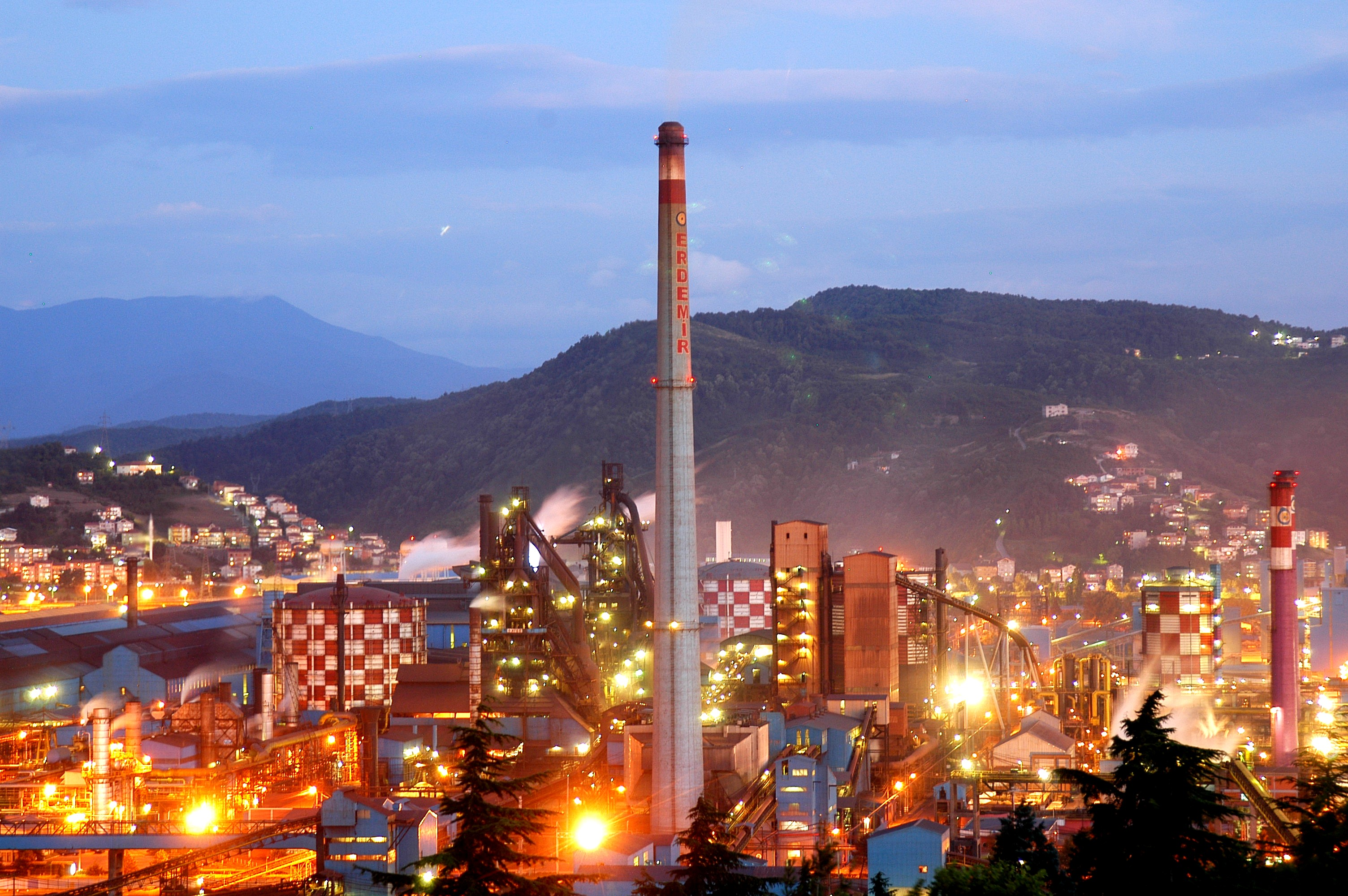 Turkish steel works of Erdemir